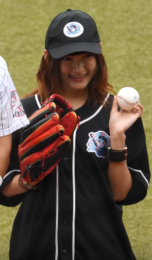 西本りみです。